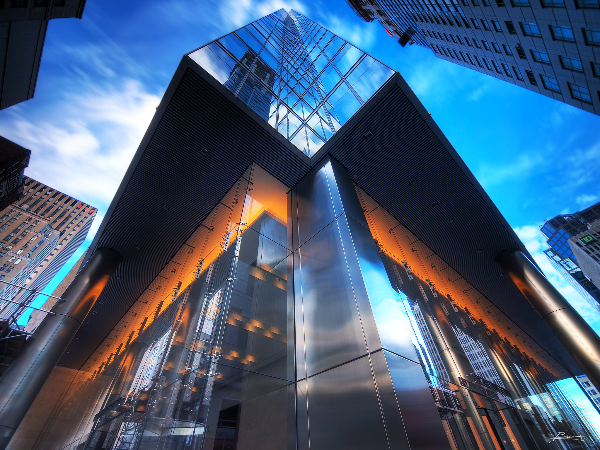 Bay Adelaide Centre, Toronto, Canada.